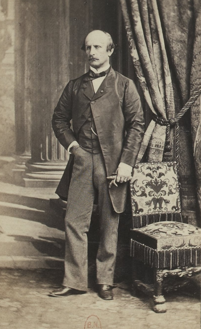 Album des députés au Corps législatif entre 1852-1857.